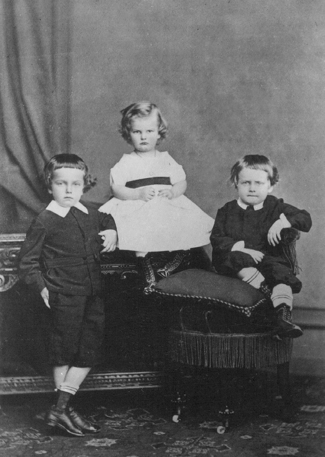 Filhos da Princesa Dona Leopoldina de Bragança e do Príncipe Luís Augusto de Saxe-Coburgo-Gota. A partir da esquerda: Dom Pedro Augusto, Dom José Fernando e Dom Augusto Leopoldo.